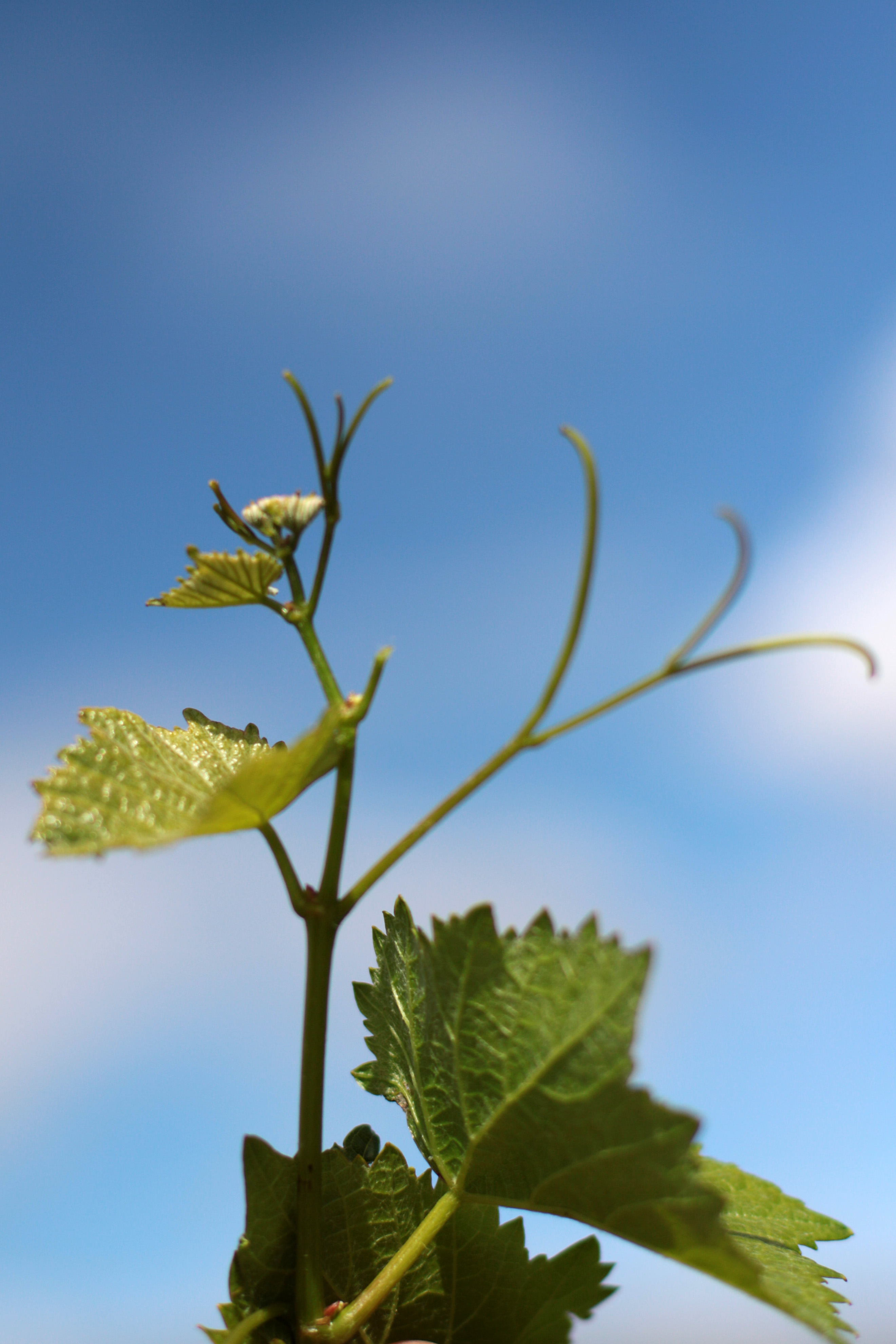 Apex d'un rameau de vigne